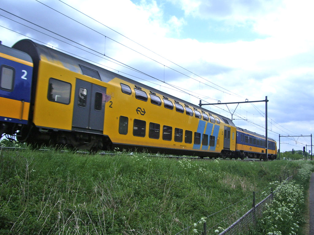 DDM-rijtuig in een Intercitytrein. Licensing Categorie:Afbeelding Nederlands spoorwegmaterieel